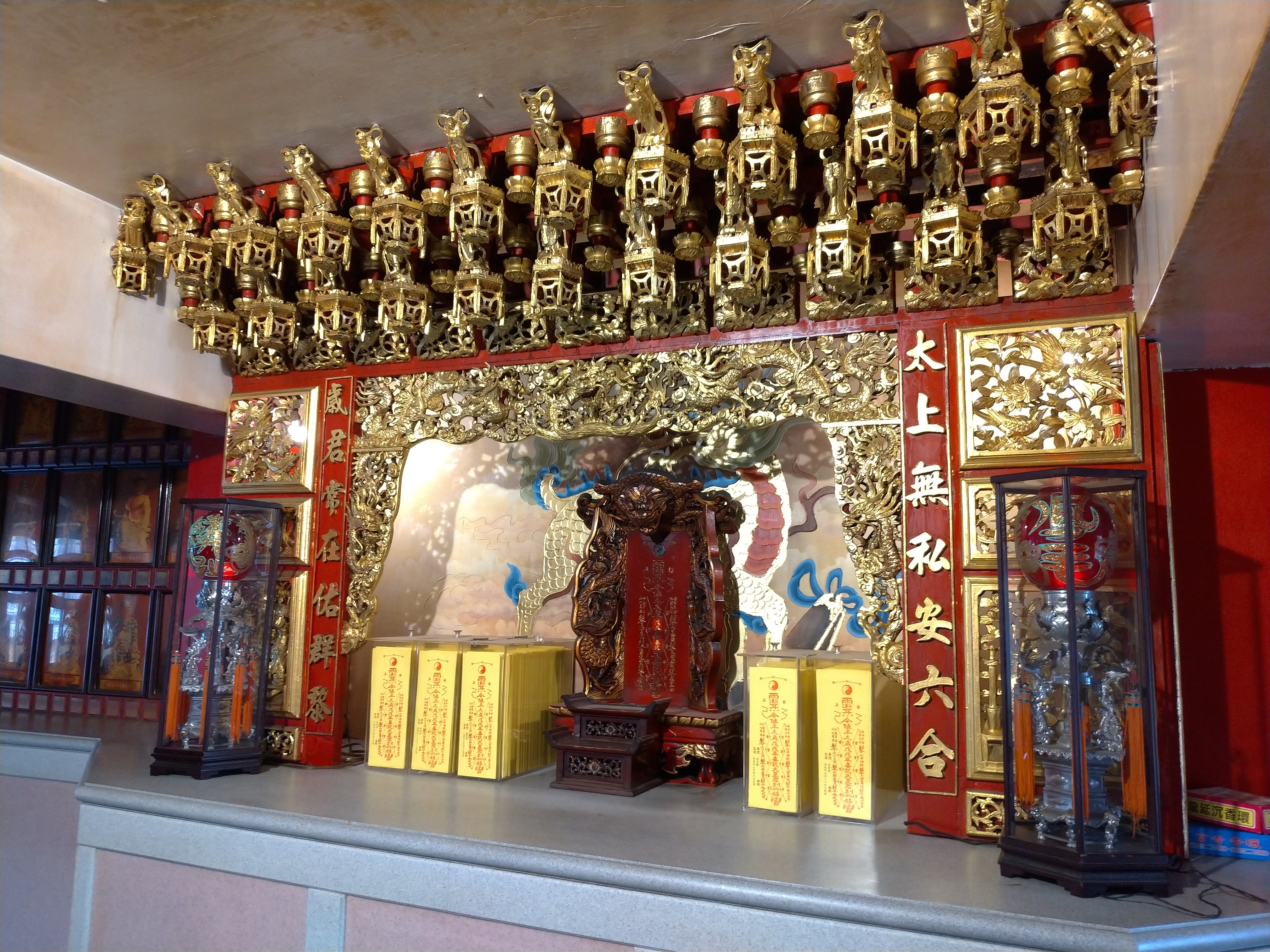 中文（台灣）: 太歲殿龕楣為｢五龍罩｣，雕工十分精緻。；使用本圖片請遵循(CC 姓名標示-非商業性-禁止改作)，Please follow (CC BY-NC-ND 3.0 TW)